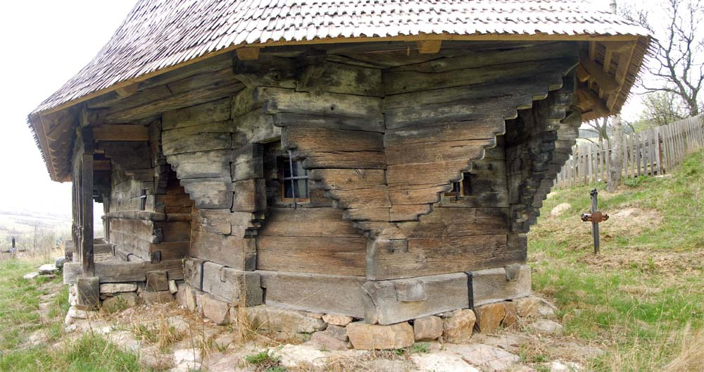 Biserica de lemn din Tusa, butea dinspre sud-est.